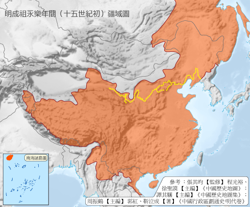 明成祖时疆域